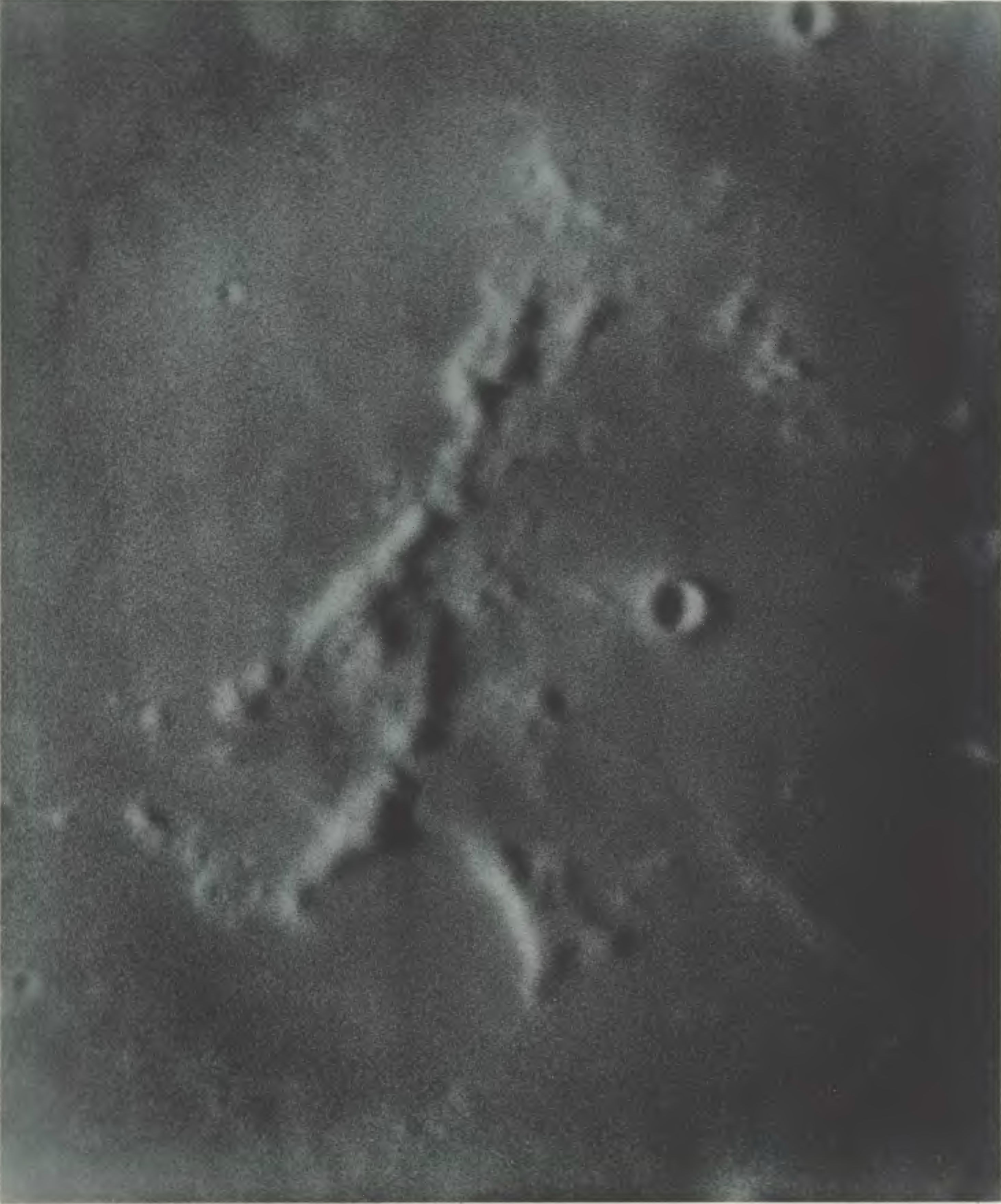 Photographischer Mond-Atlas vornehmlich auf Grund von focalen Negativen der Lick-Sternwarte im Massstabe eines Monddurchmessers von 10 Fuss ausgeführt von Professor Ladislaus Weinek. Heft IV. Tafel 71